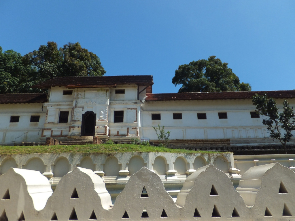 සිංහල: සිංහලේ අගනුවර (මහනුවර) සෙංකඩගල වූ යුගයේ රජ මාලිගාව